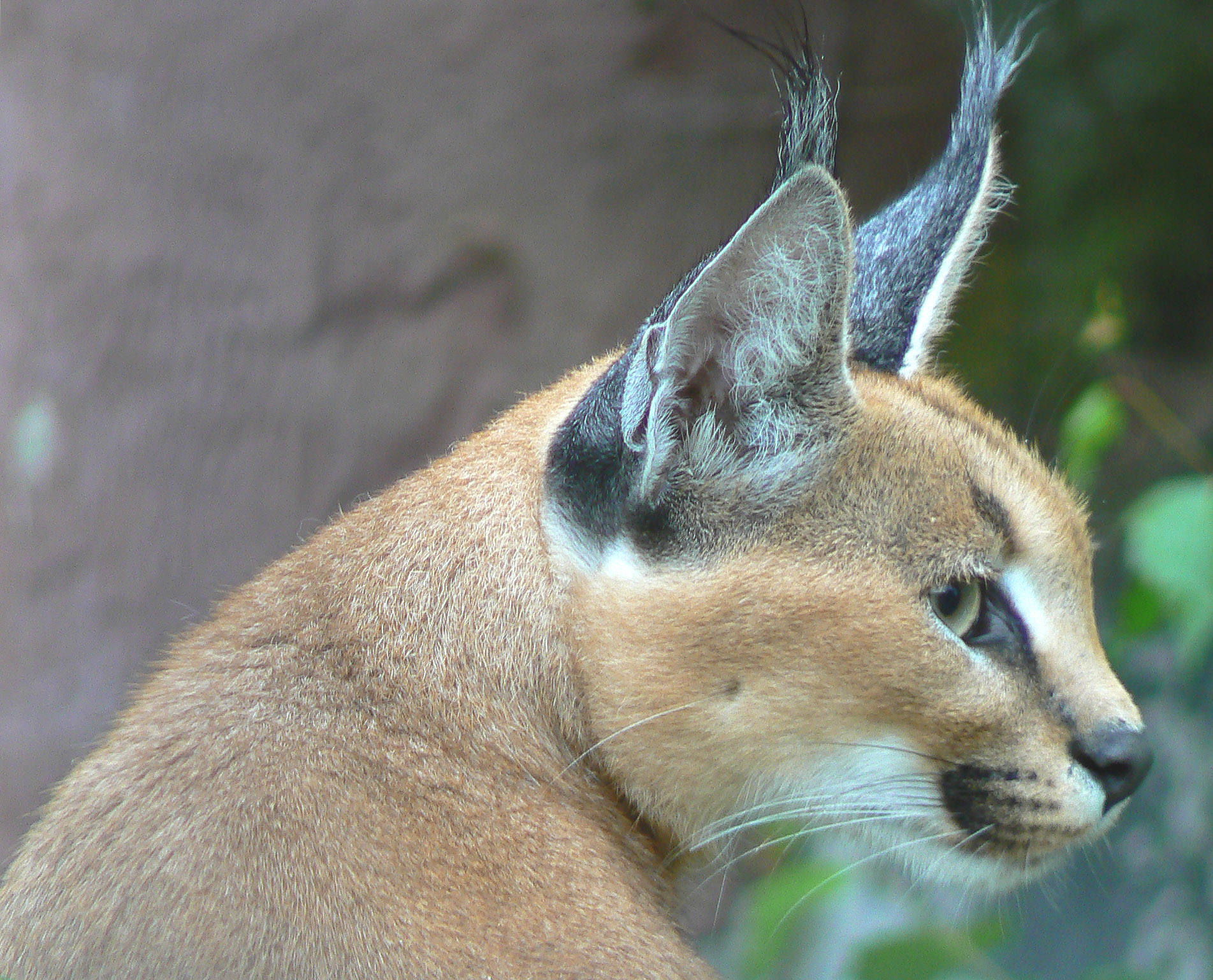 Caracal (profile view)